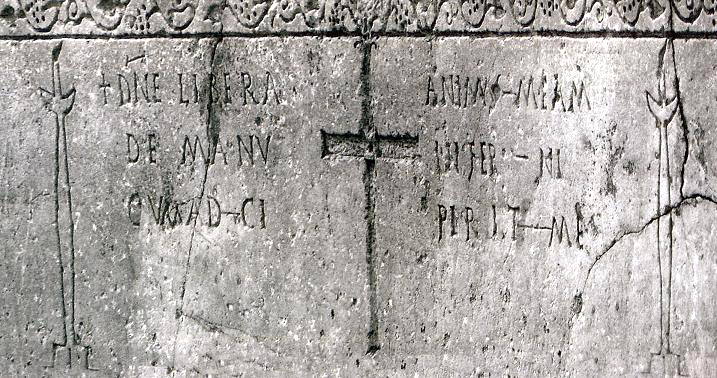 Sarcofago con iscrizione da Nuceria Alfaterna. AE 2006, 296: D(omi)ne libera anima(m) meam/ de manu inferni/ cum a c perit me